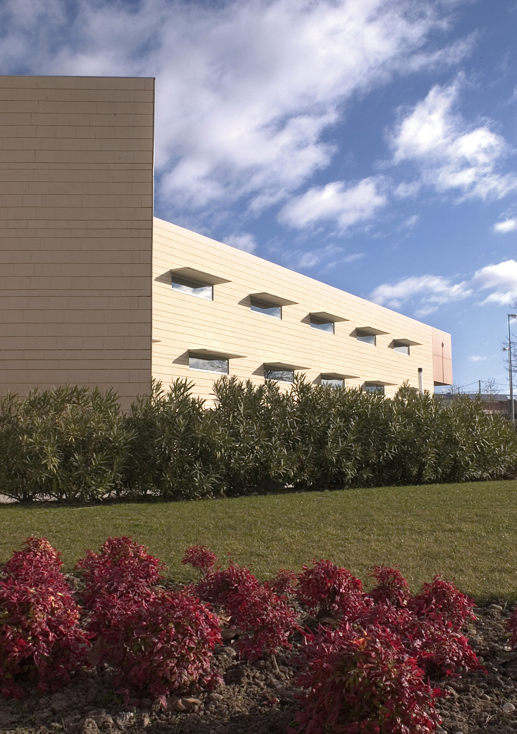 Complejo Científico Tenológico de la Universidad de La Rioja, en España.